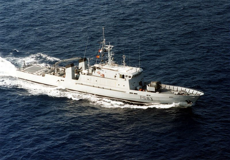 Prise de vue aérienne du patrouilleur P400 La boudeuse P683